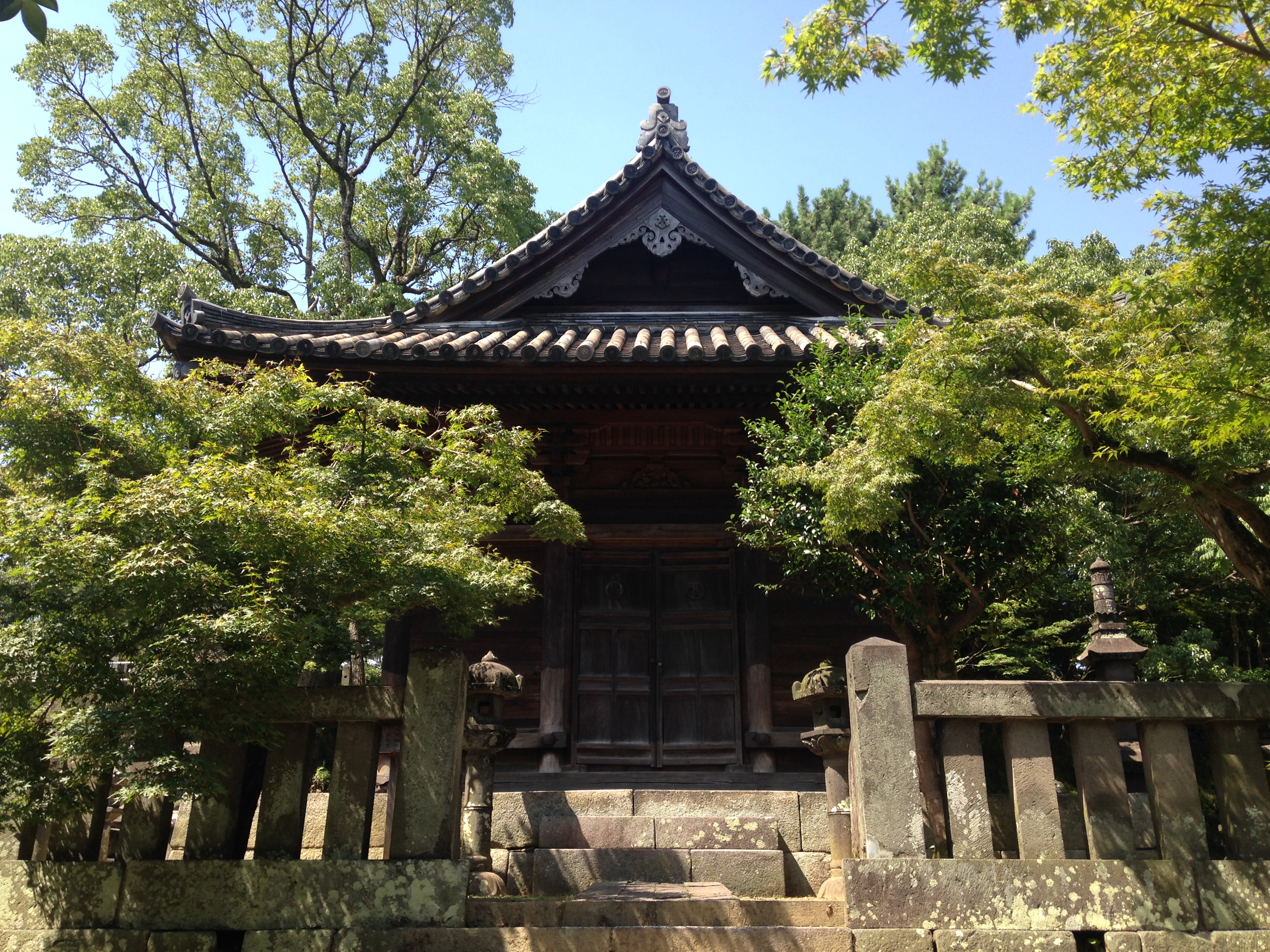 梅林寺の有馬家霊廟